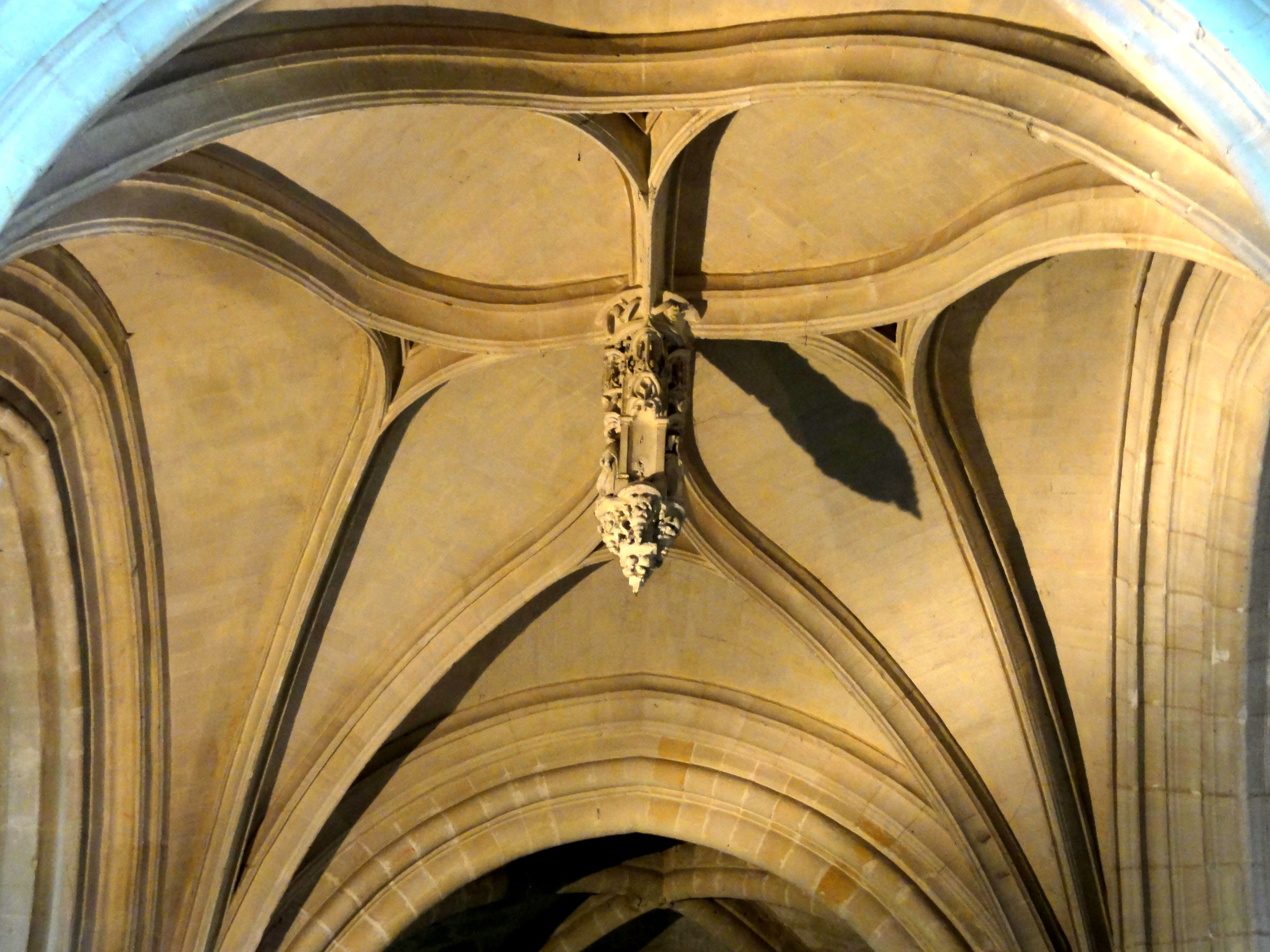 Chapelle Saint-Denis à l'est du croisillon sud, voûte flamboyante.